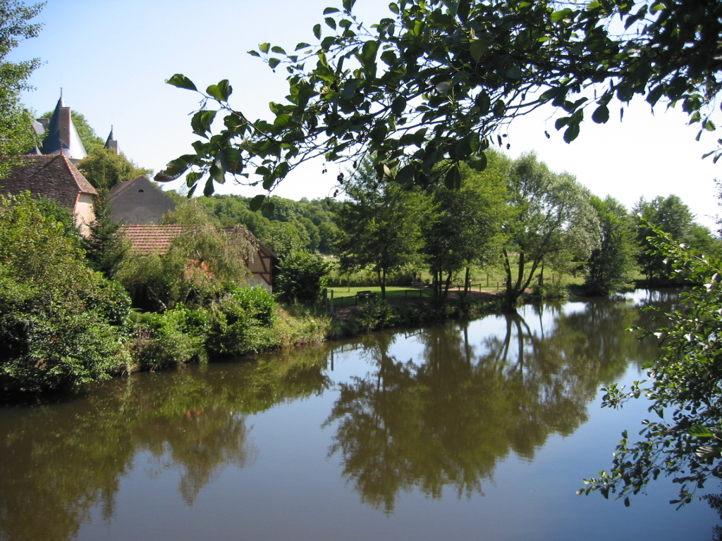 Jaligny-sur Besbre (France) - La Besbre